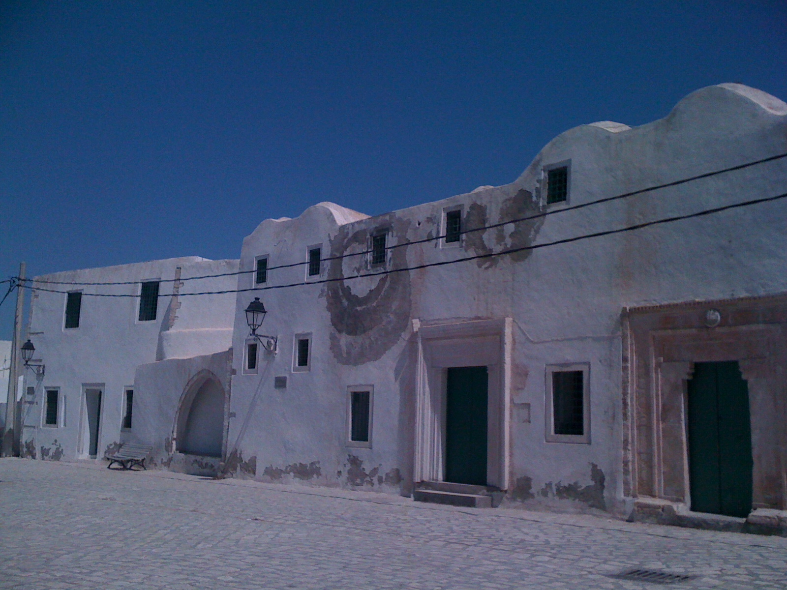 Façade de la mosquée Sidi Brahim El Jemni à Houmt Souk